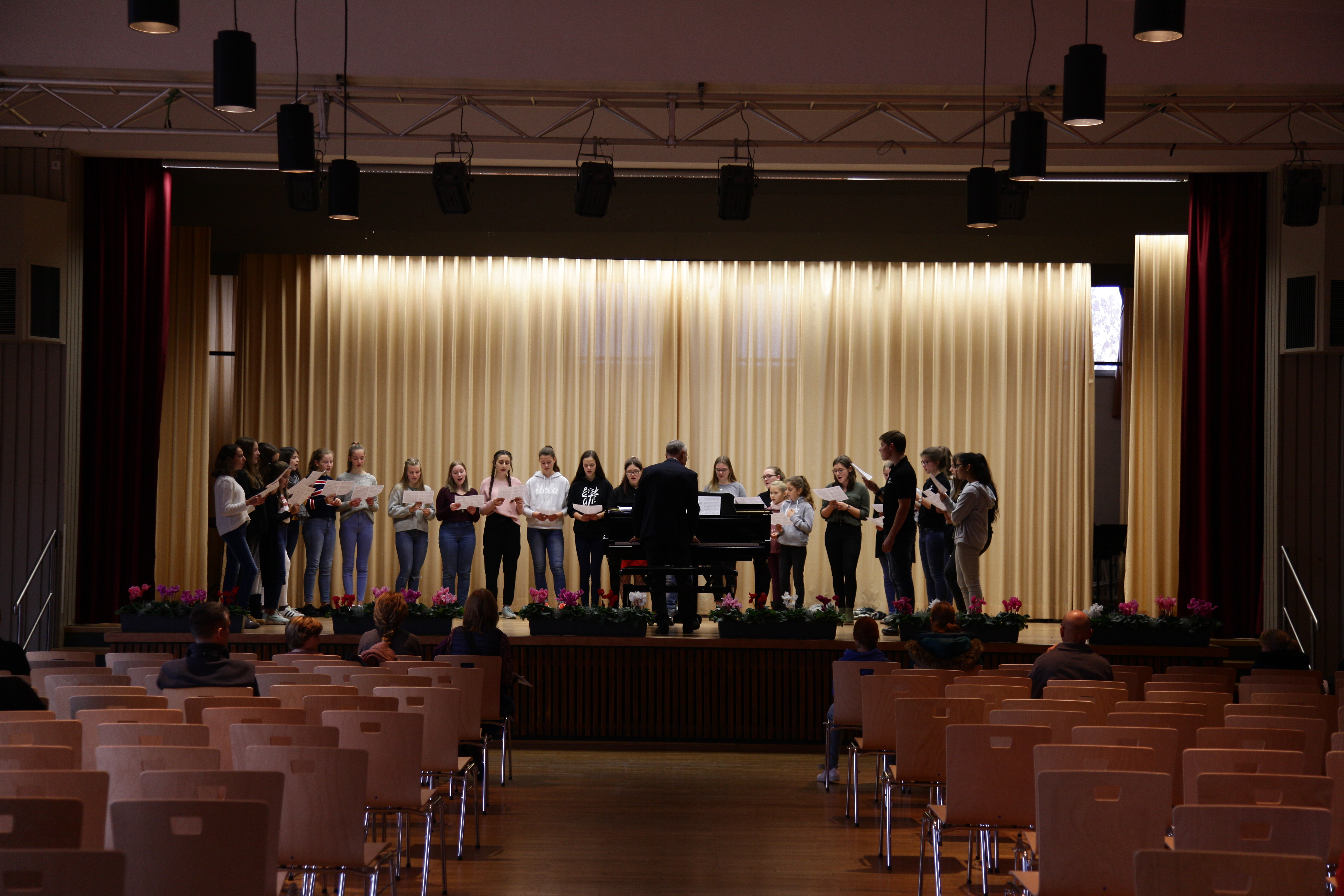 Chorprobe in der Aula der Immanuel-Kant-Schule in Rüsselsheim am Main während des Tages der offenen Tür 2018